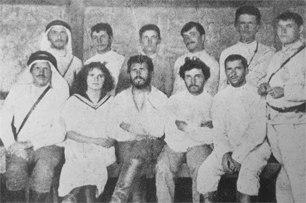 גדרה - הביל"ויים